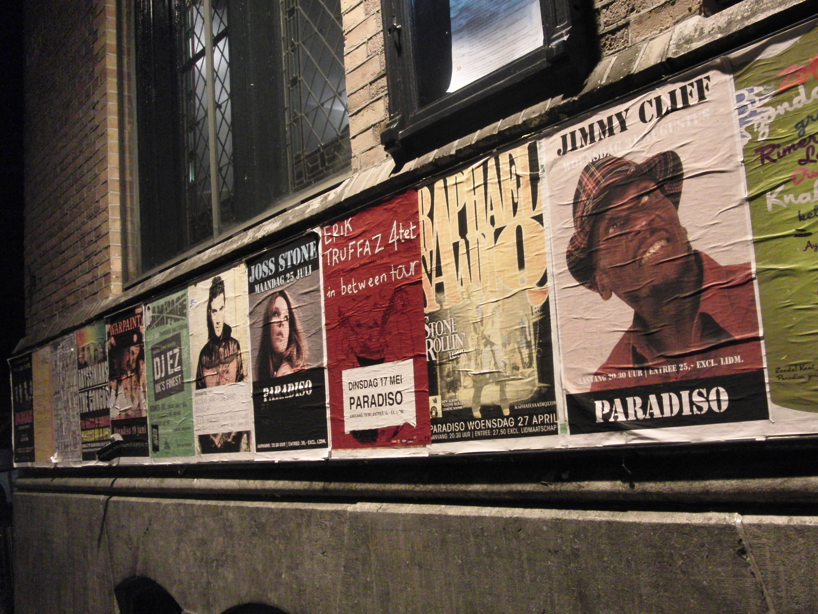 Posters op muur Paradiso Amsterdam 2011